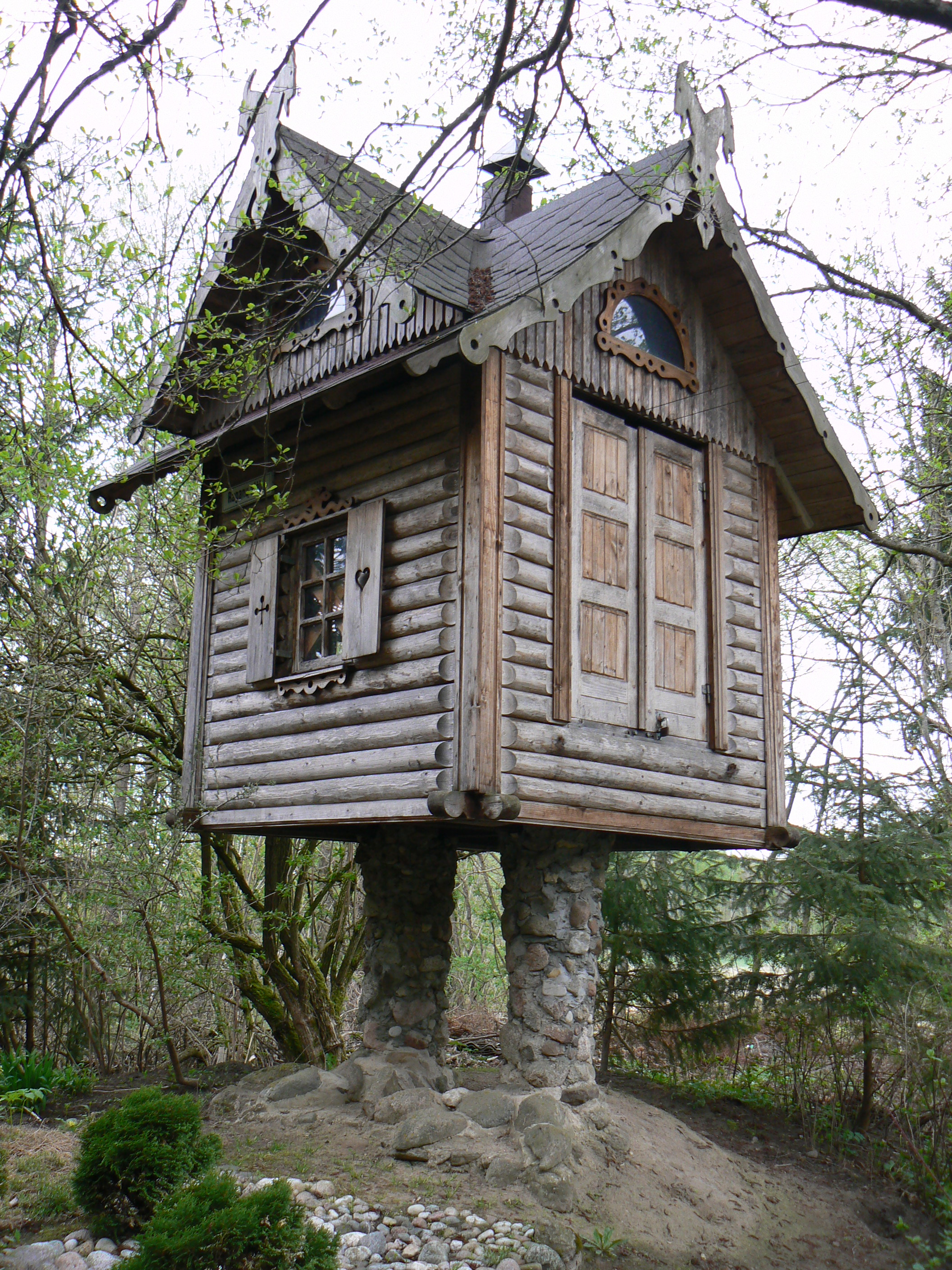 Majorův dům na kuřích nohách, ze kterého vylétá čarodějnice na koštěti.